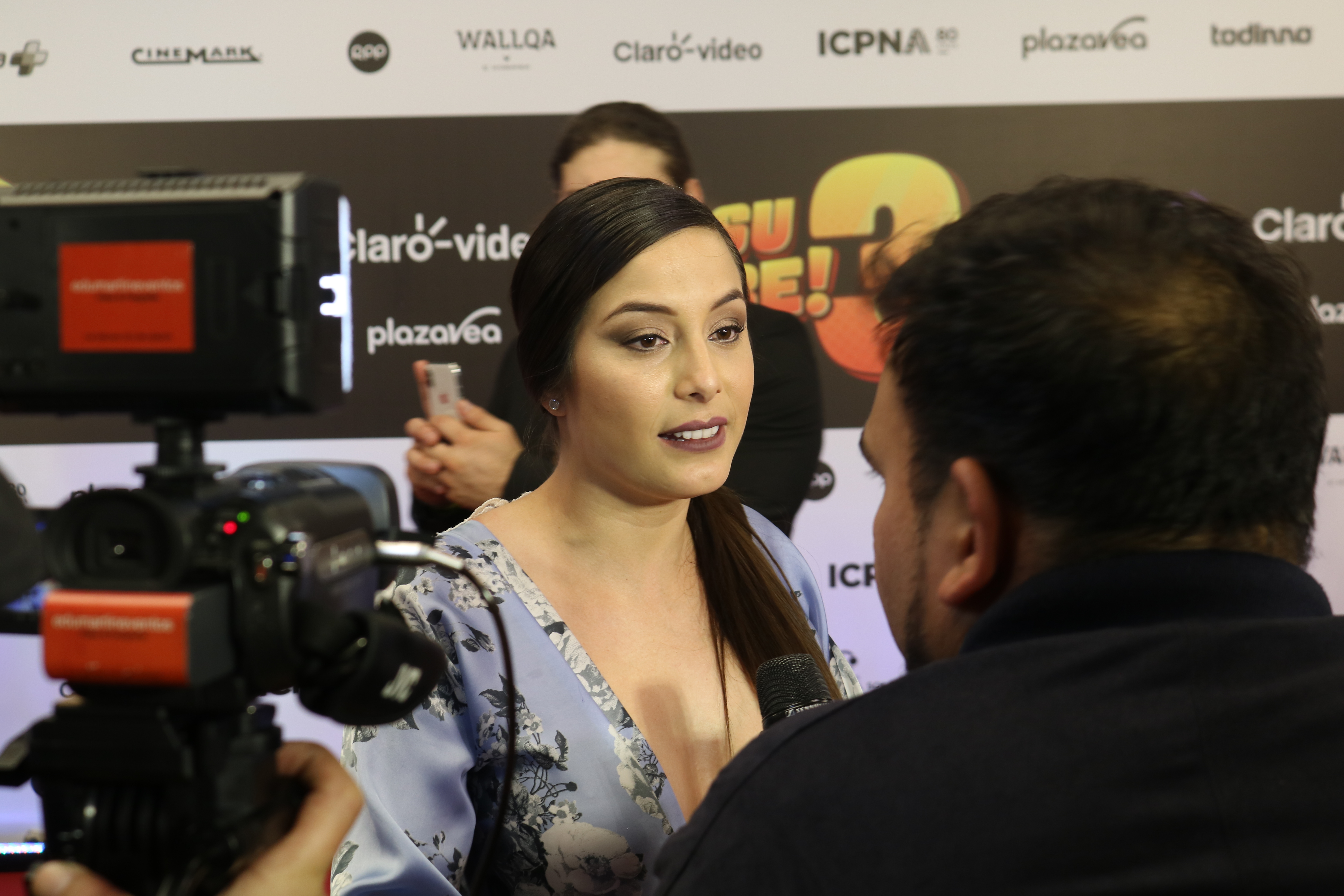 Natalia Salas durante la alfombra roja de Asu Mare 3.